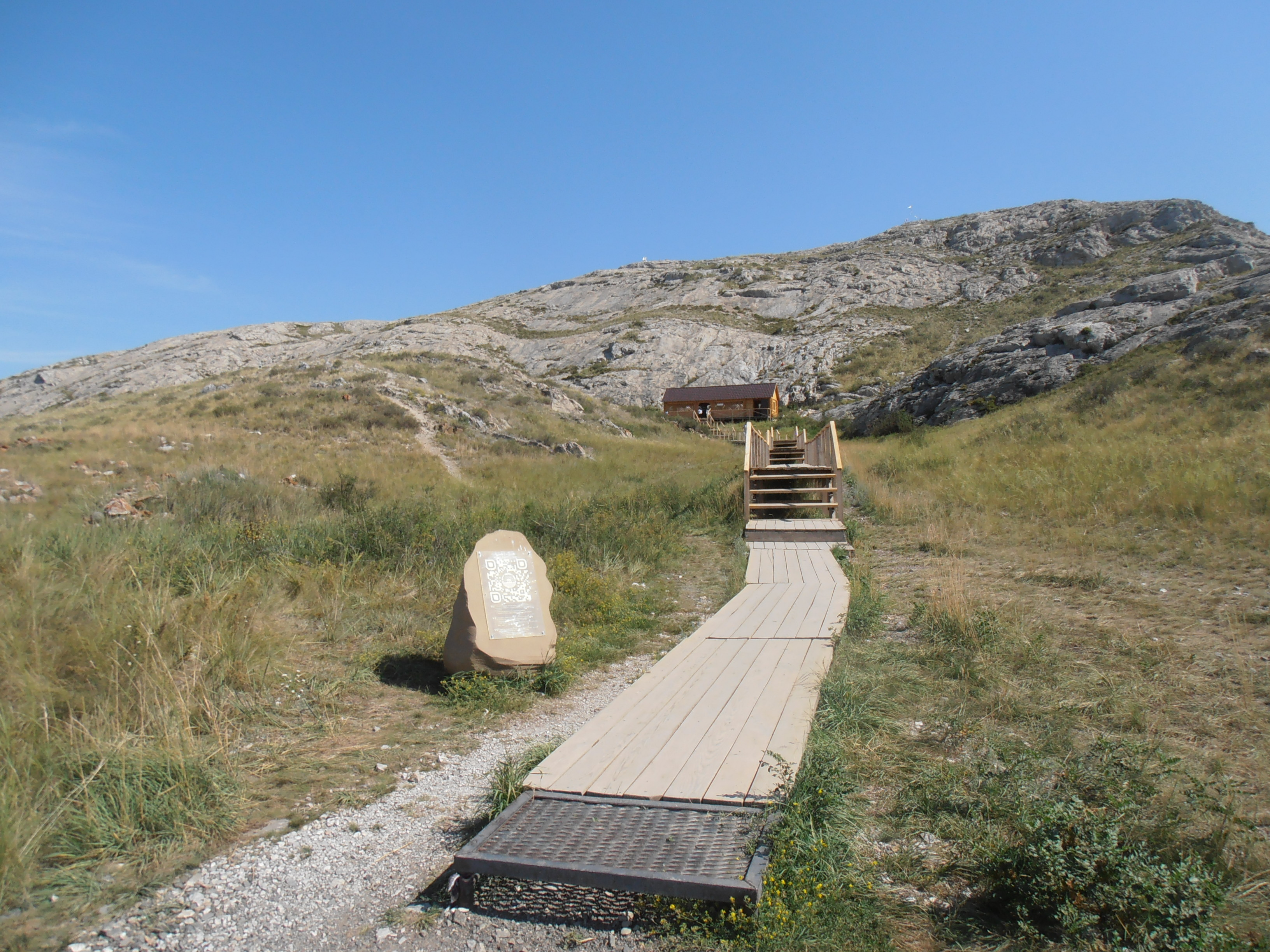 Дорожка к пещере Коныр-Аулие, расположенной в горе Актас (20 км от села Токтамыс Абайского района Восточно-Казахстанской области).